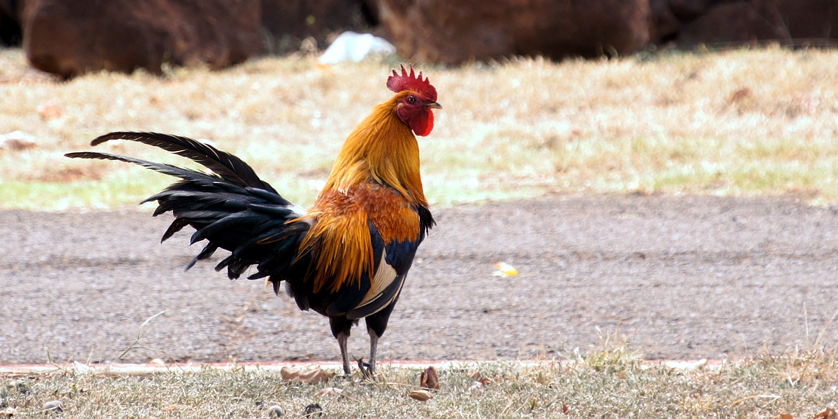 Иллюстрация для викиучебника Гавайеведение